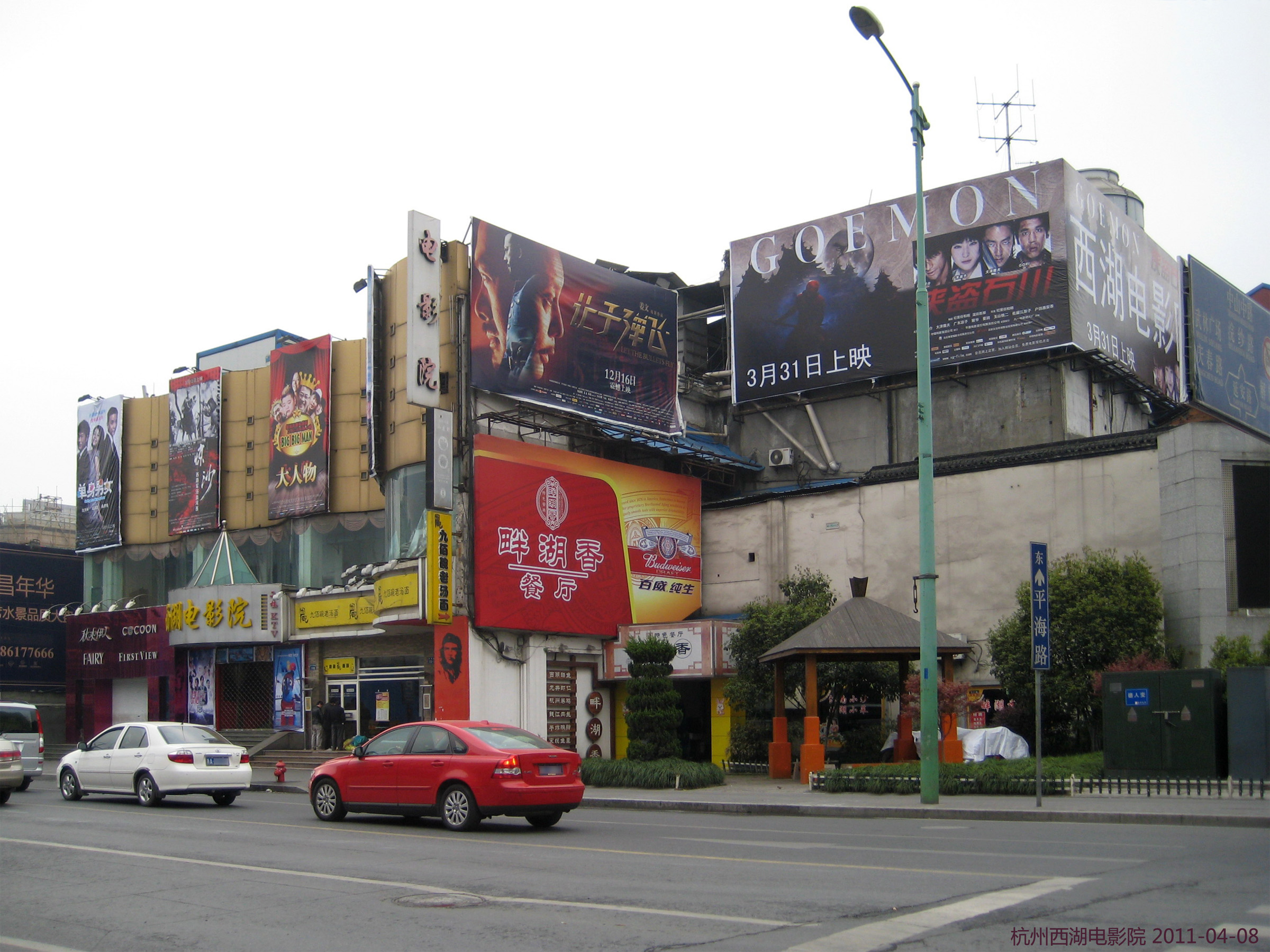 西湖电影院 Xi Hu Cinema